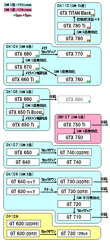 Kepler